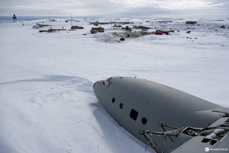 Поселок комендатуры на острове Греэм-Белл